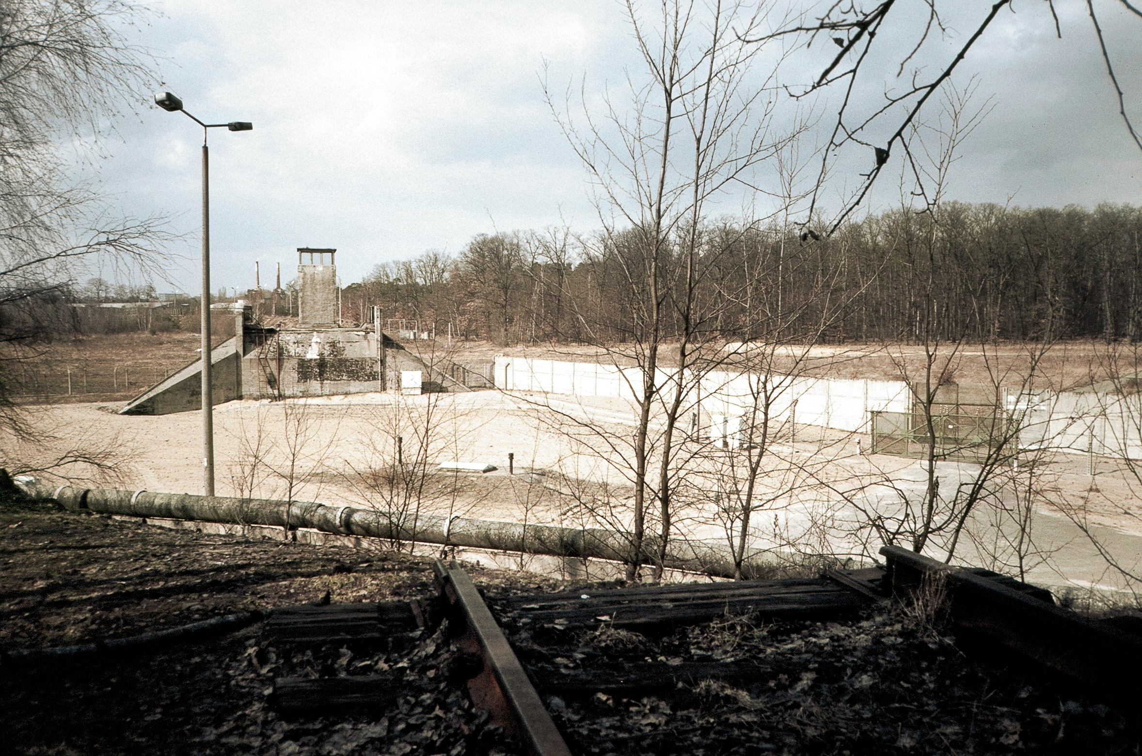 Grenzanlagen bei Berlin-Heilgensee